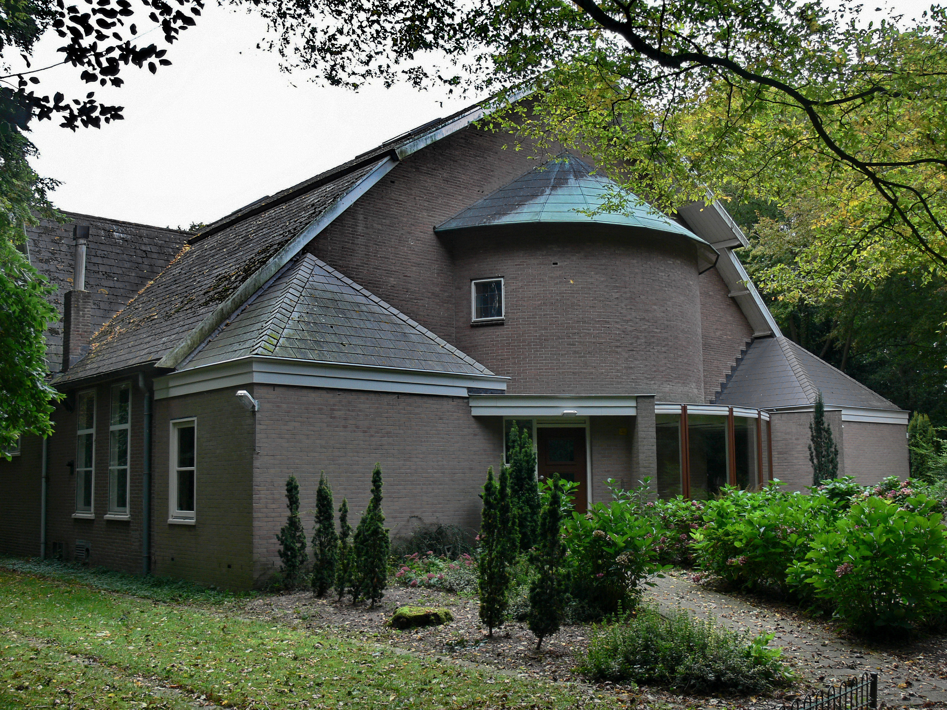 De BEDEVAARTSKERK is in 1913 gebouwd als noodkerk naar ontwerp van Jan Stuyt als onderdeel van het bedevaartscomplex 'Onze Lieve Vrouwe ter Nood'. Het plan was om de noodkerk na vijftig jaar te vervangen door een basiliek, maar zover is het nooit gekomen. Eind jaren vijftig is het priesterkoor verhoogd en uitgebreid met een halfronde absis. De rode Hollandse pannen op het kerkdak zijn in 1988 vervangen door leien in maasdekking. Tegelijkertijd zijn bovenin het dak van buitenaf niet zichtbare legramen aangebracht en kregen de vensters voorzetramen. Het als dakruiter uitgevoerde klokkentorentje boven de voorgevel is meermalen vernieuwd. Het huidige exemplaar dateert uit 1996, evenals de drie door Petit en Fritsen in Aarle-Rixtel gegoten klokken. De oorspronkelijke banken zijn in de jaren vijftig vervangen door de huidige banken met handhaving van het oude bankenplan. Opvallend is de ziende kapconstructie die nog voorzien is van de originele polychromie.